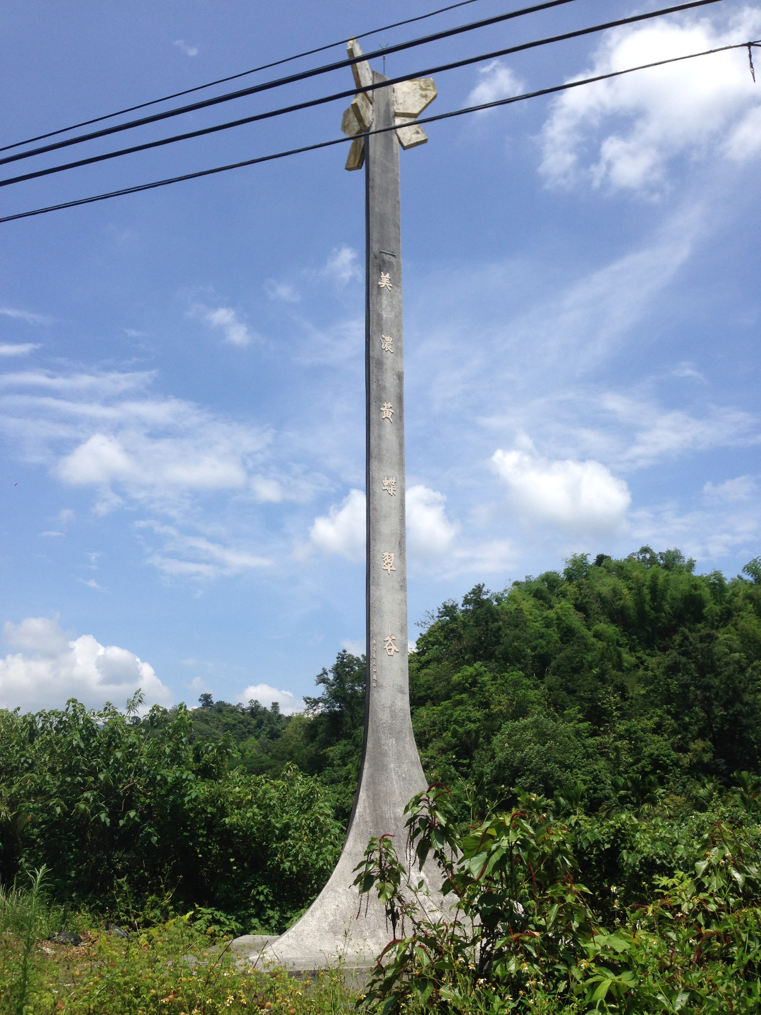 黃蝶翠谷柱標